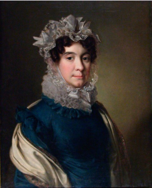 Анна Гавриловна Кашкина, ур. Бахметева (1777—1825), жена Н.Е.Кашкина, мать декабриста Сергея Николаевича Кашкина (1799—1868).